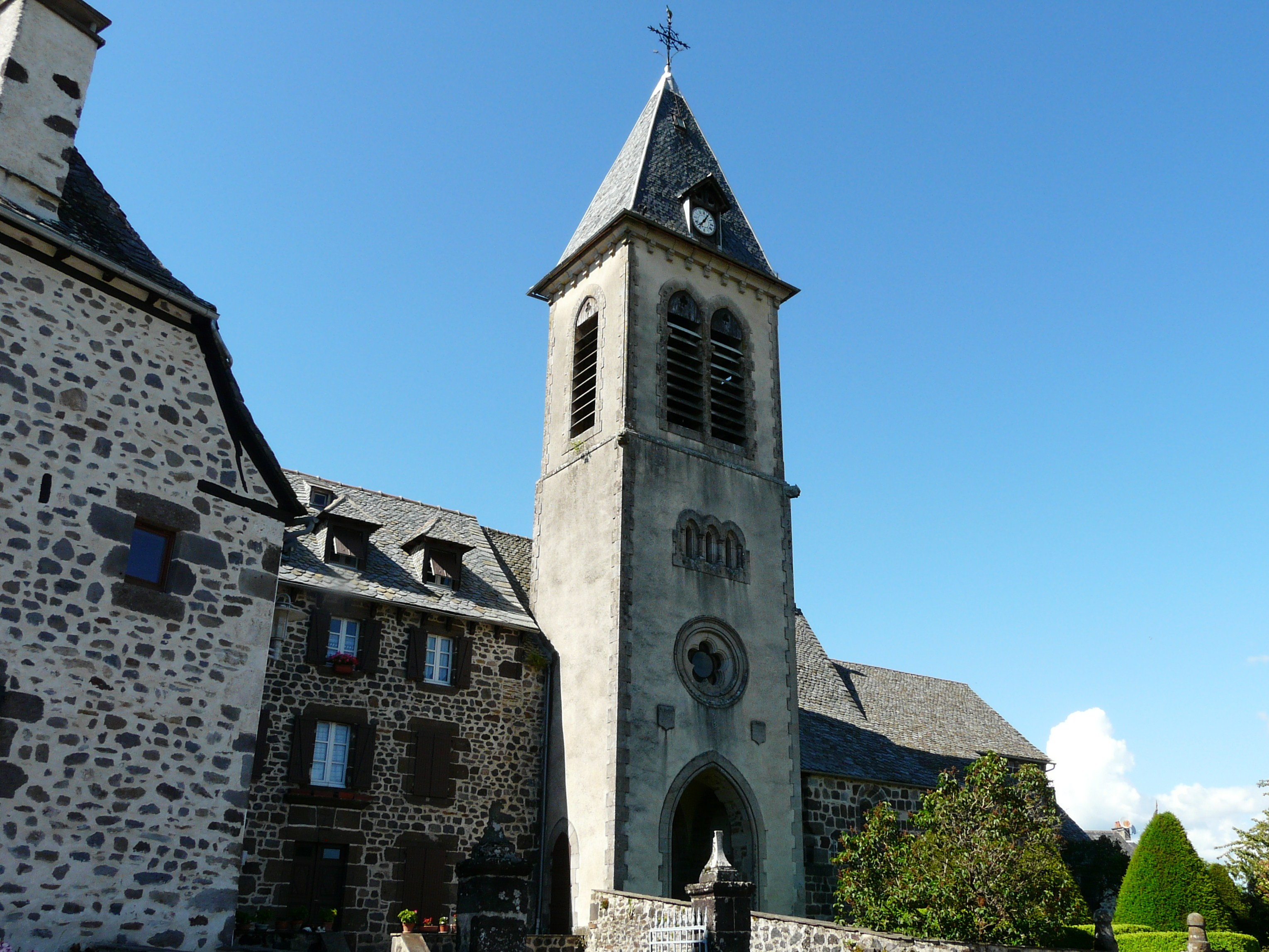 L'église de Taussac, Aveyron, France.